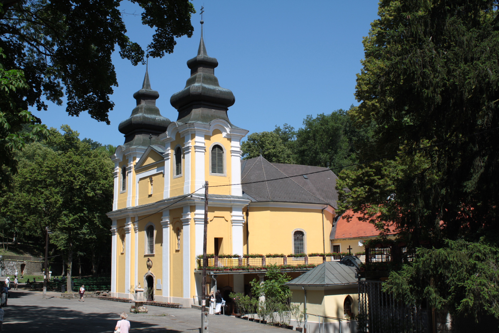 Szentkúti római katolikus templom (Nagyboldogasszony) (Mátraverebély, Szentkút) This is a photo of a monument in Hungary. Identifier: 6722